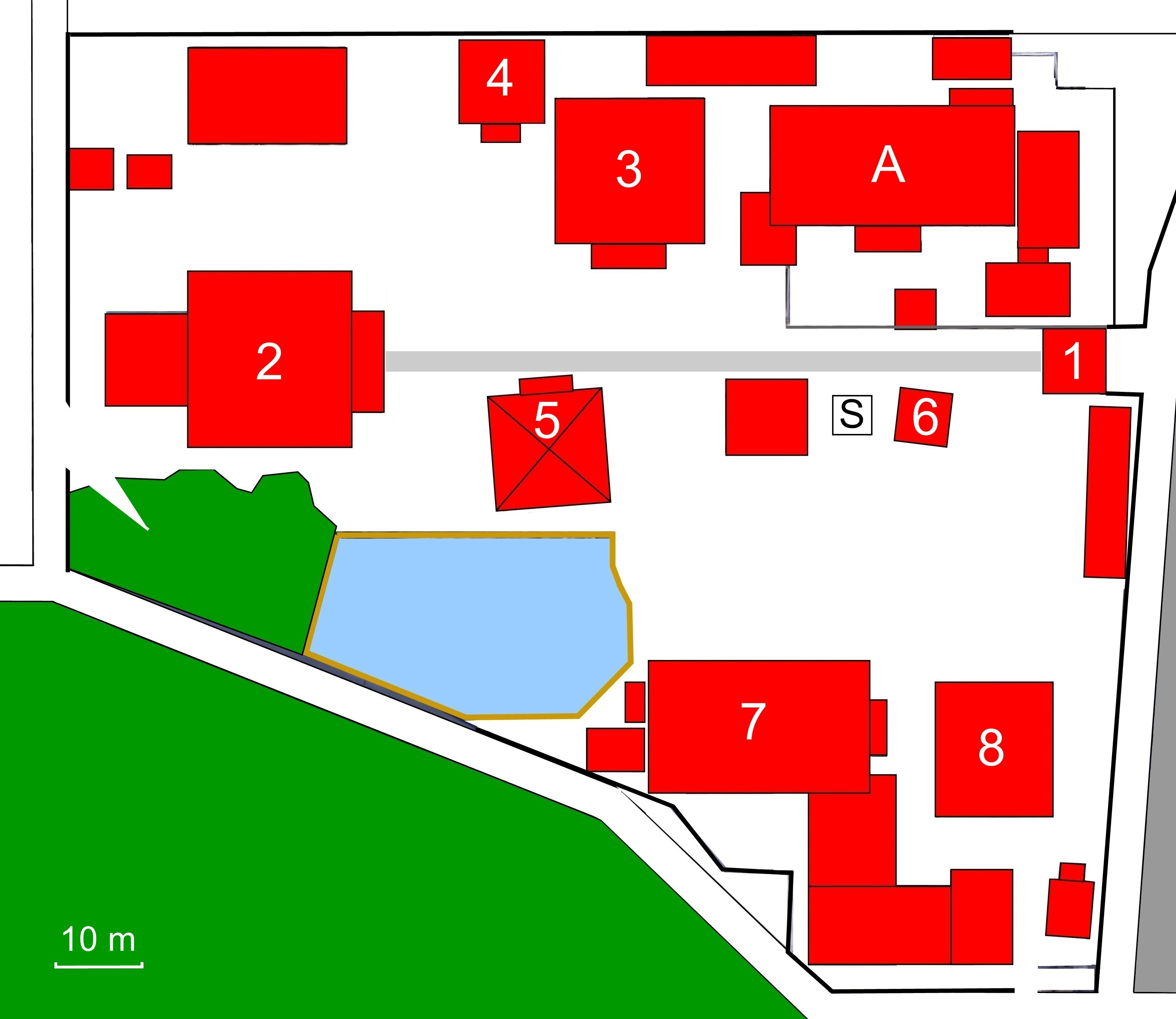 Layout of taqchibana-dera,, Nara prefecture, Japan